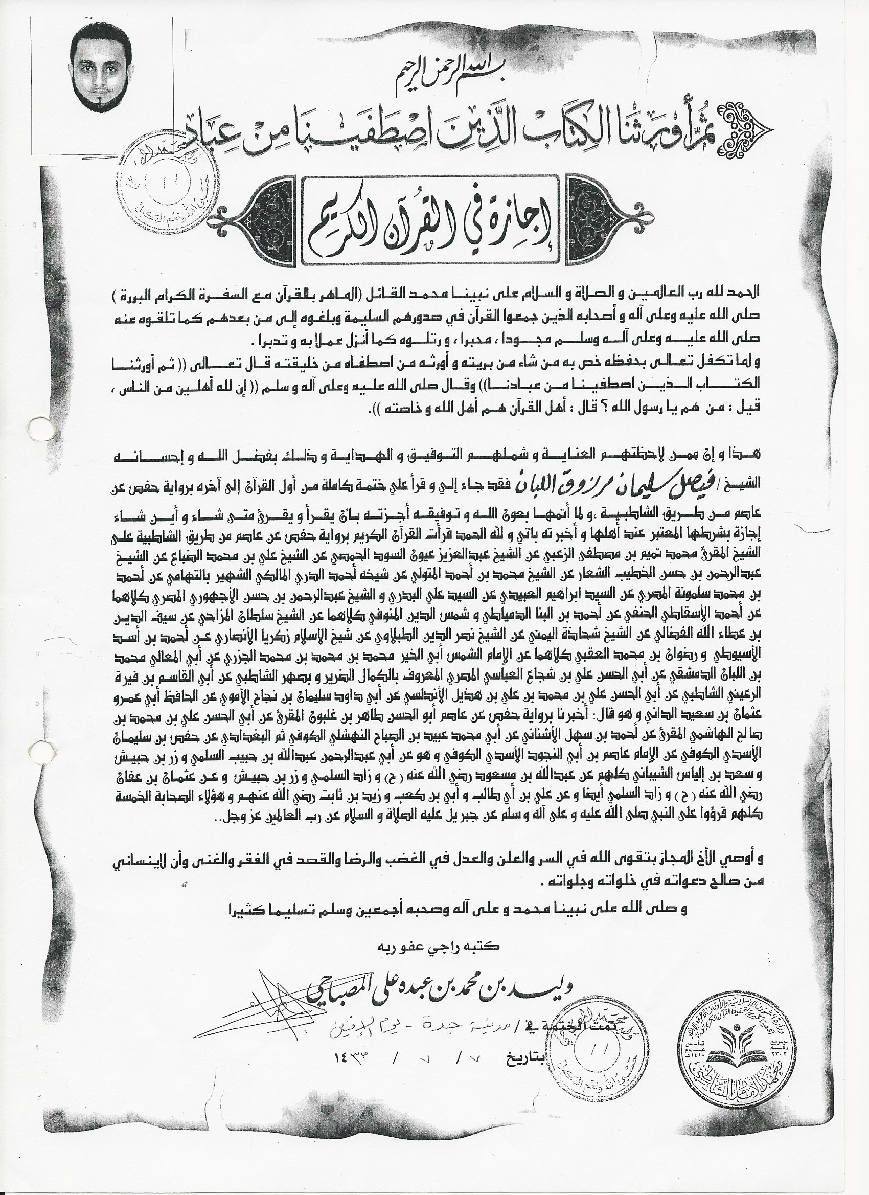 اجازة القرآن الكريم برواية حفص عن عاصم لفيصل لبان